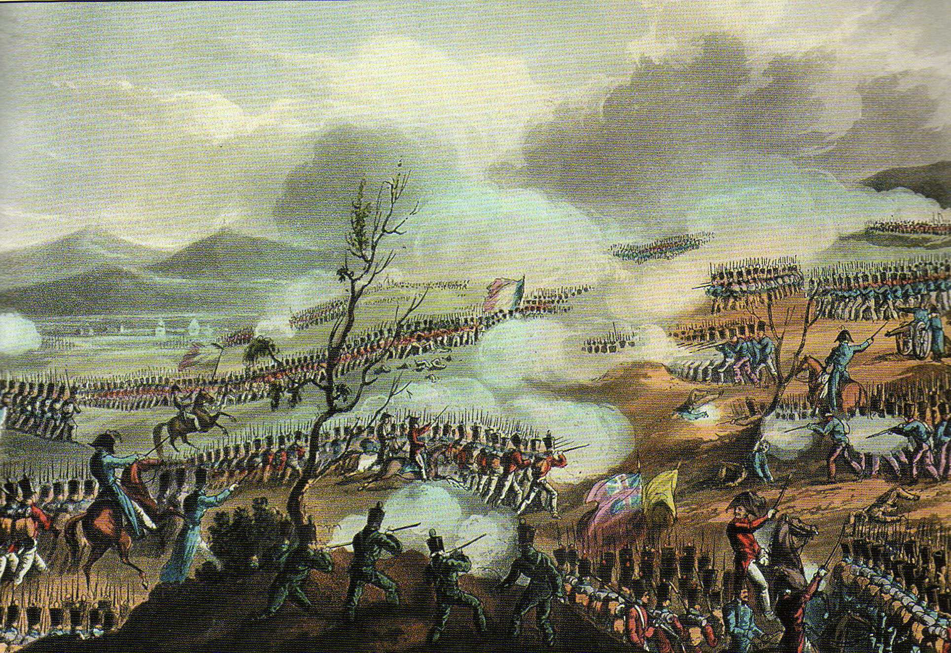 Gravure coloriée de la bataille de la Nivelle, livrée le 10 novembre 1813